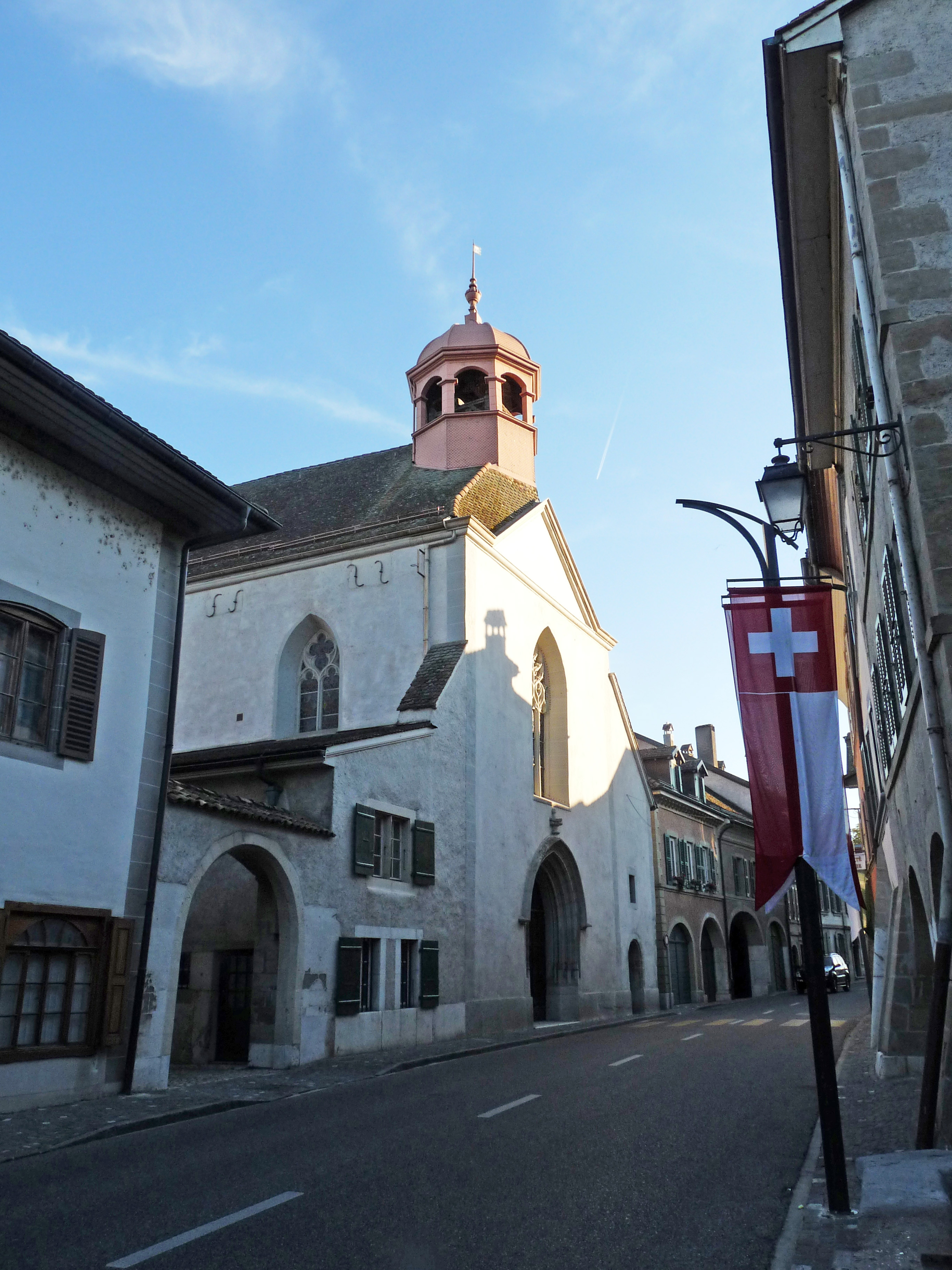 Temple de Coppet (Eglise évangélique réformée du canton de Vaud, Suisse)